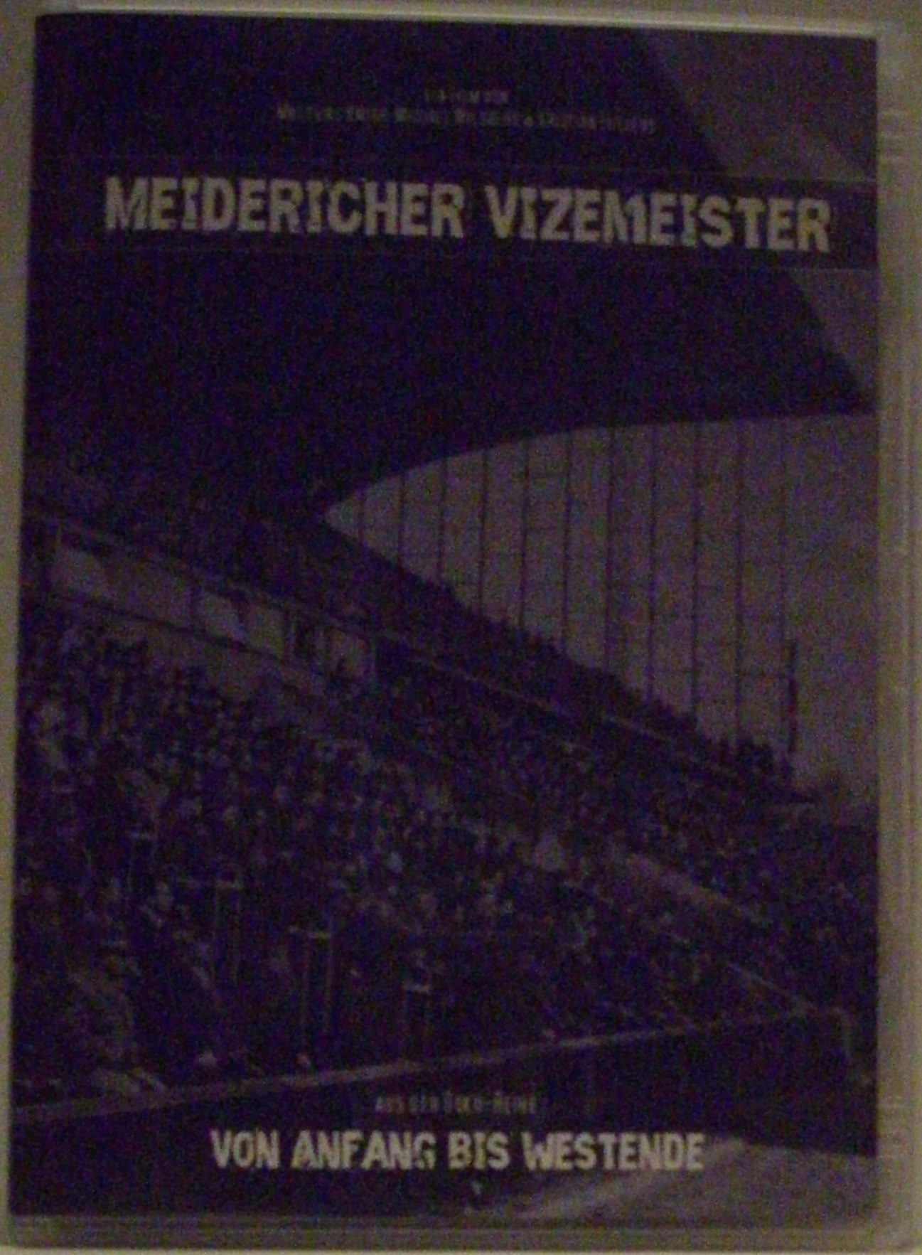 DVD des Films "Meidericher Vizemeister"